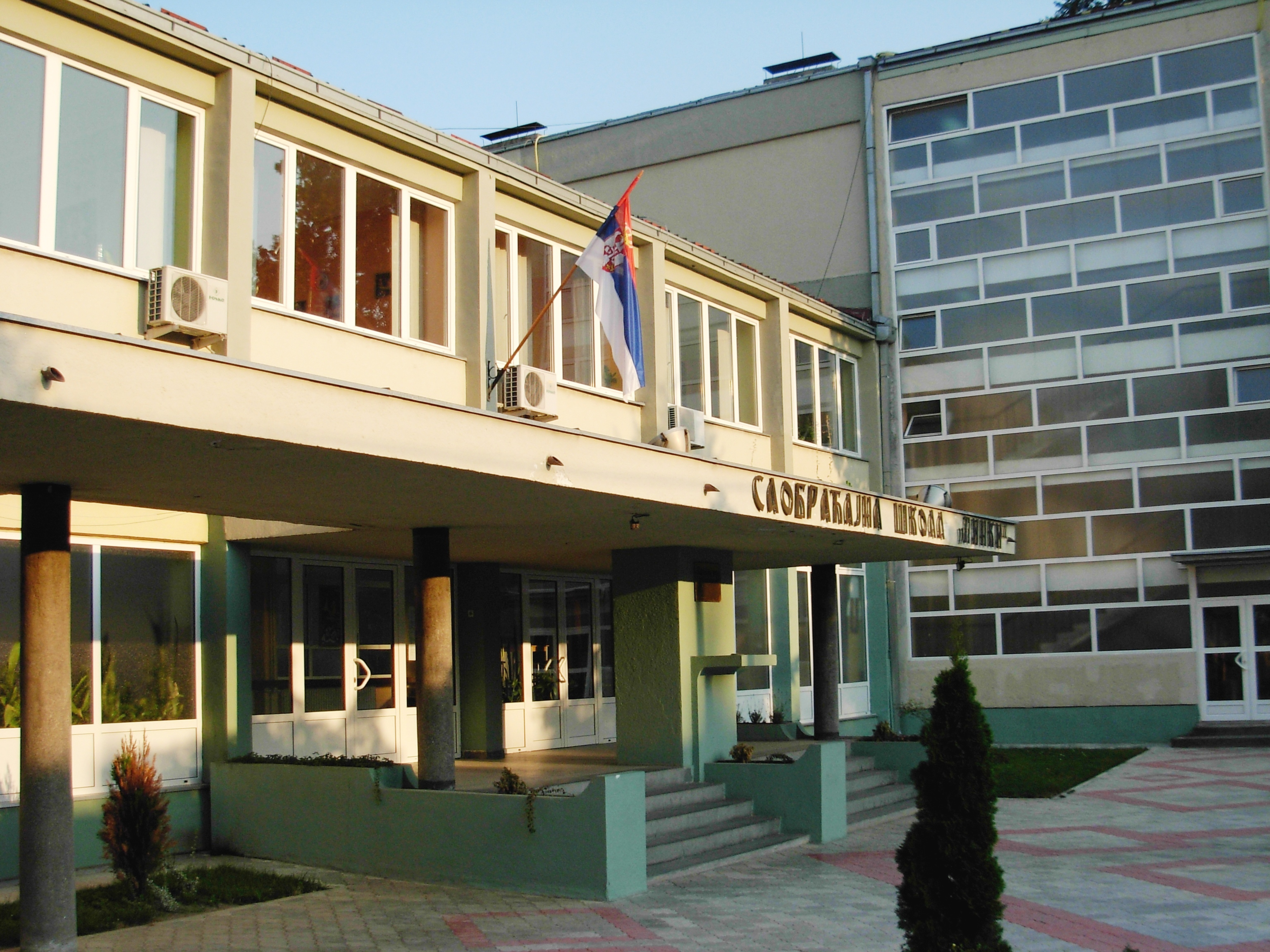 Saobraćajna škola "Pinki" u Novom Sadu.